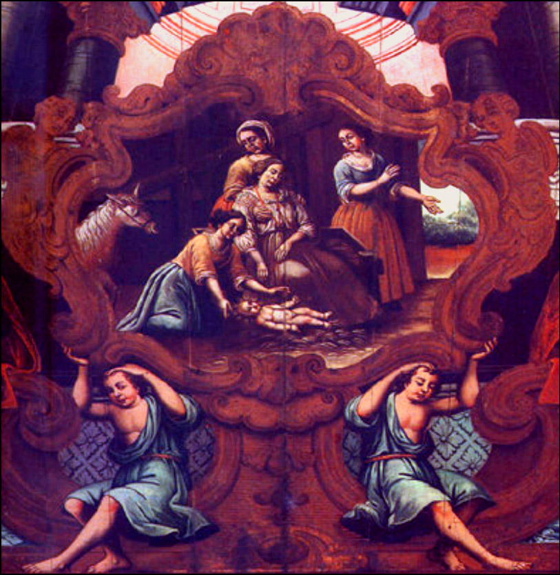 Nascimento de São Francisco. Detalhe do forro junto ao arco cruzeiro do altar-mor, nave principal da igreja do Convento de Santo Antônio da Paraíba. Madeira policromada, autoria incerta